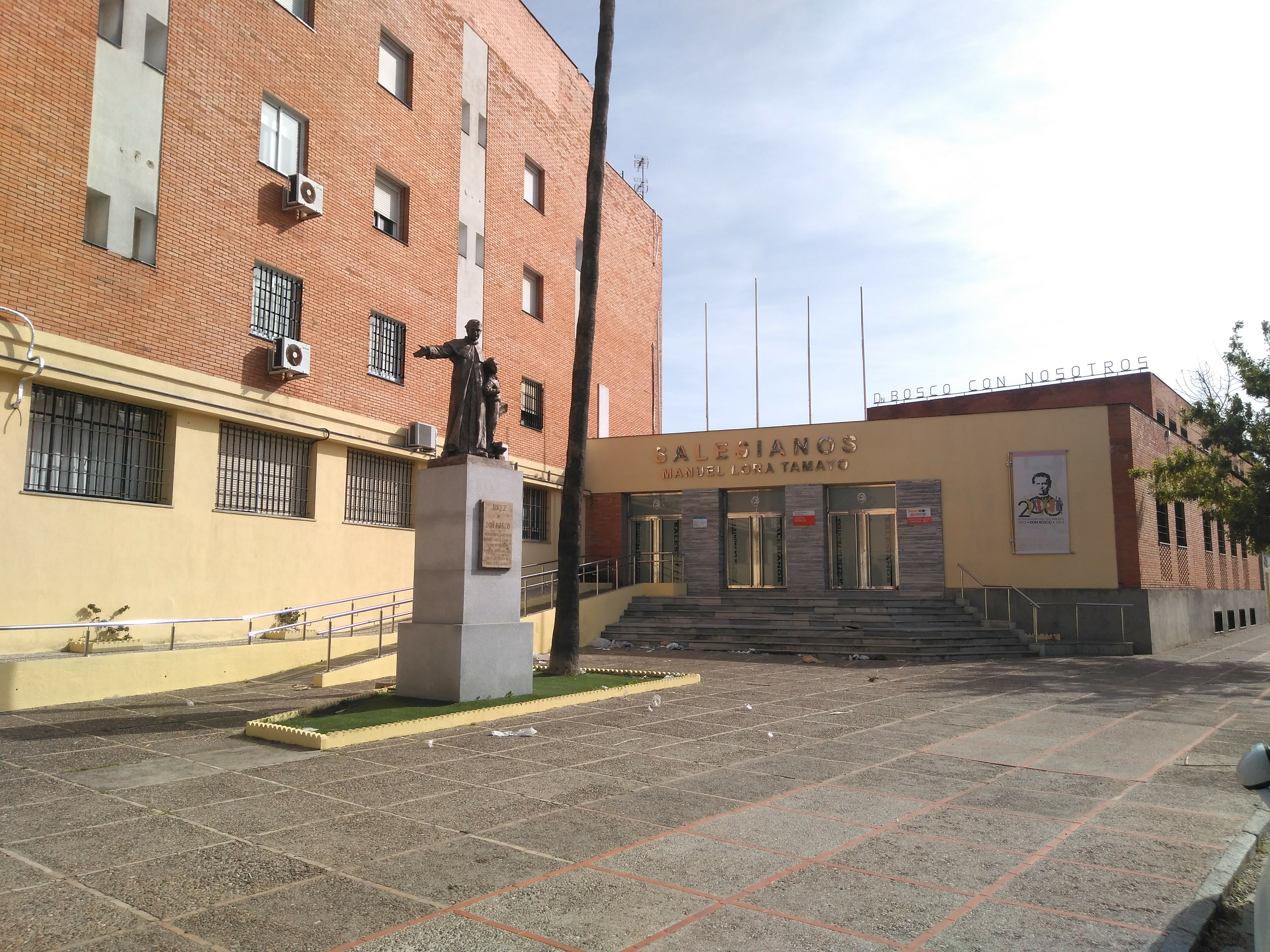 colegio salesiano Manuel Lora Tamayo, Jerez de la Frontera (España)